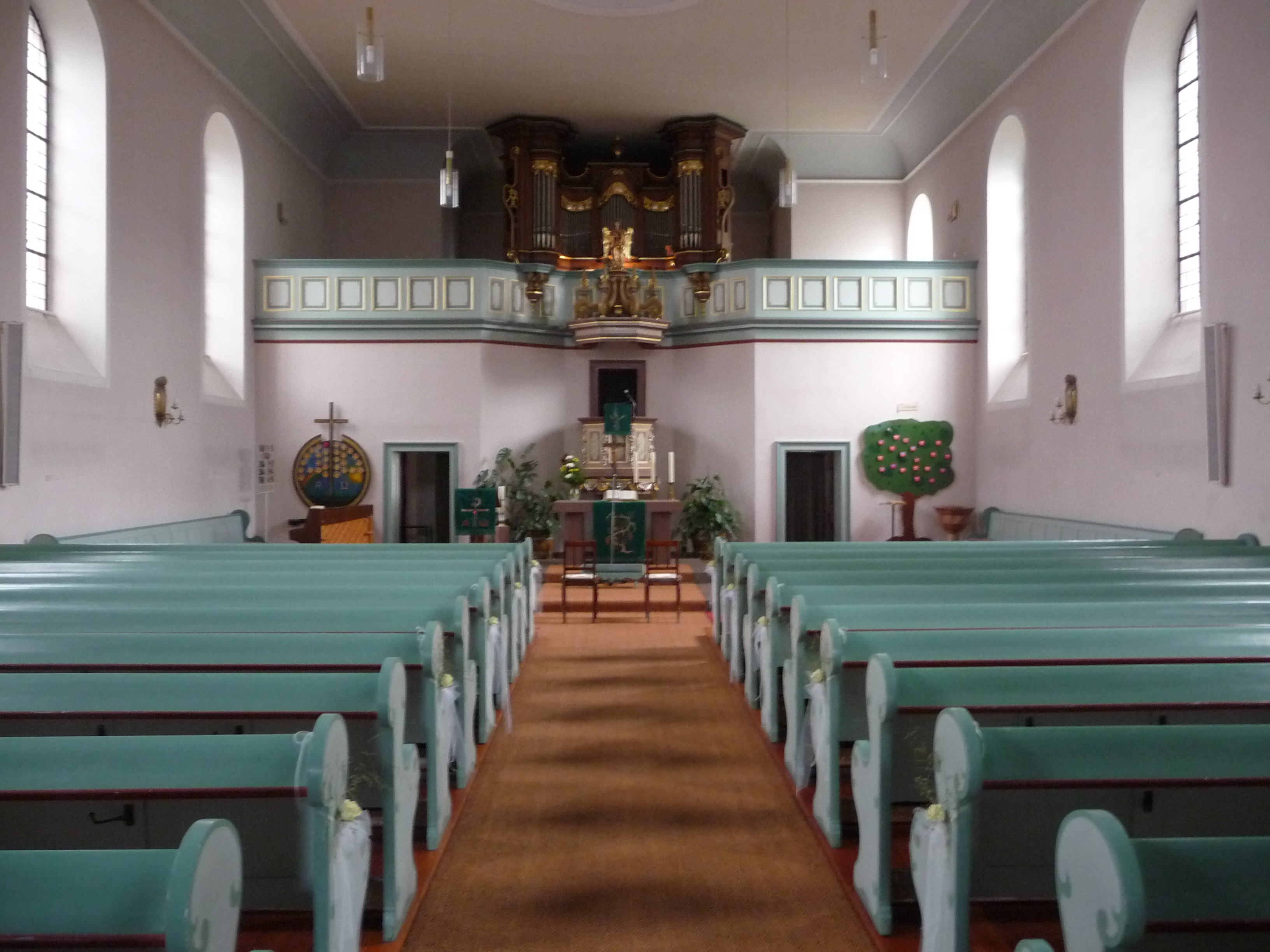 Cyriakuskirche Worms-Neuhausen Innenansicht Barockisierender Saalbau, 1905/07, Architekt Paul Meißner, Darmstadt